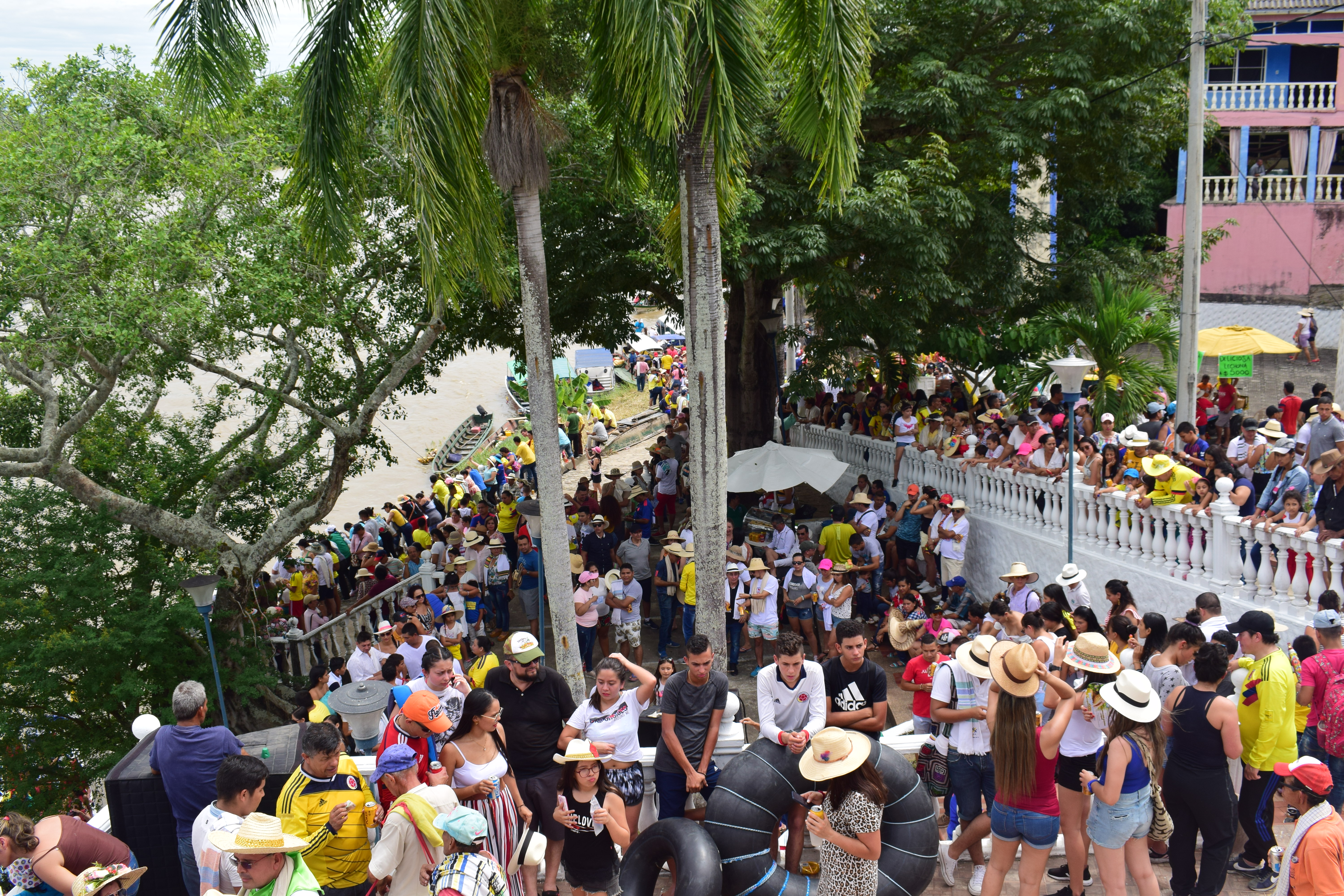 Ferias y fiestas del río grande de la Magdalena